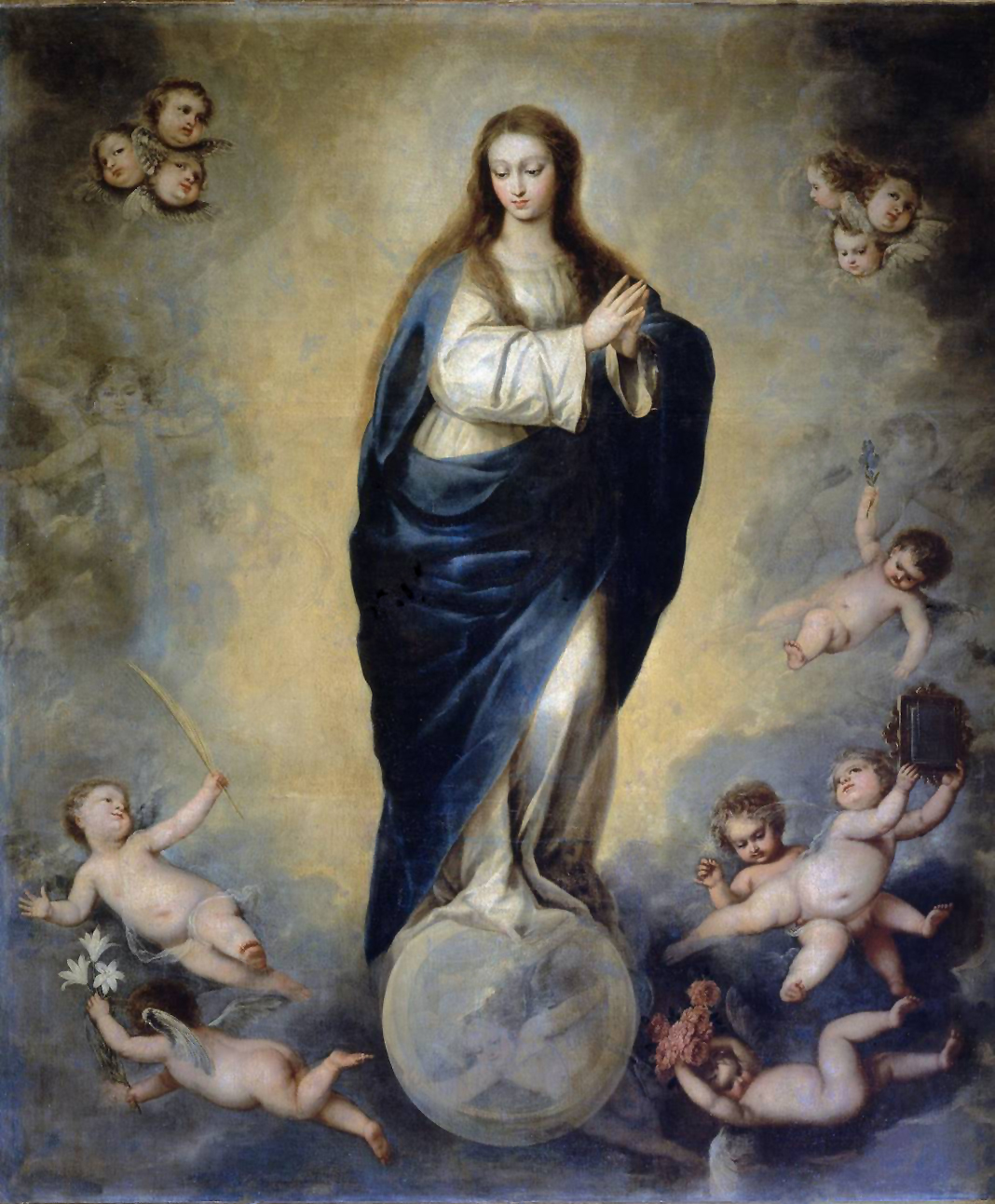 La obra representa a la Inmaculada Concepción vestida con manto azul intenso y túnica blanca, apoyada sobre una esfera que permite ver un ángel a su través.